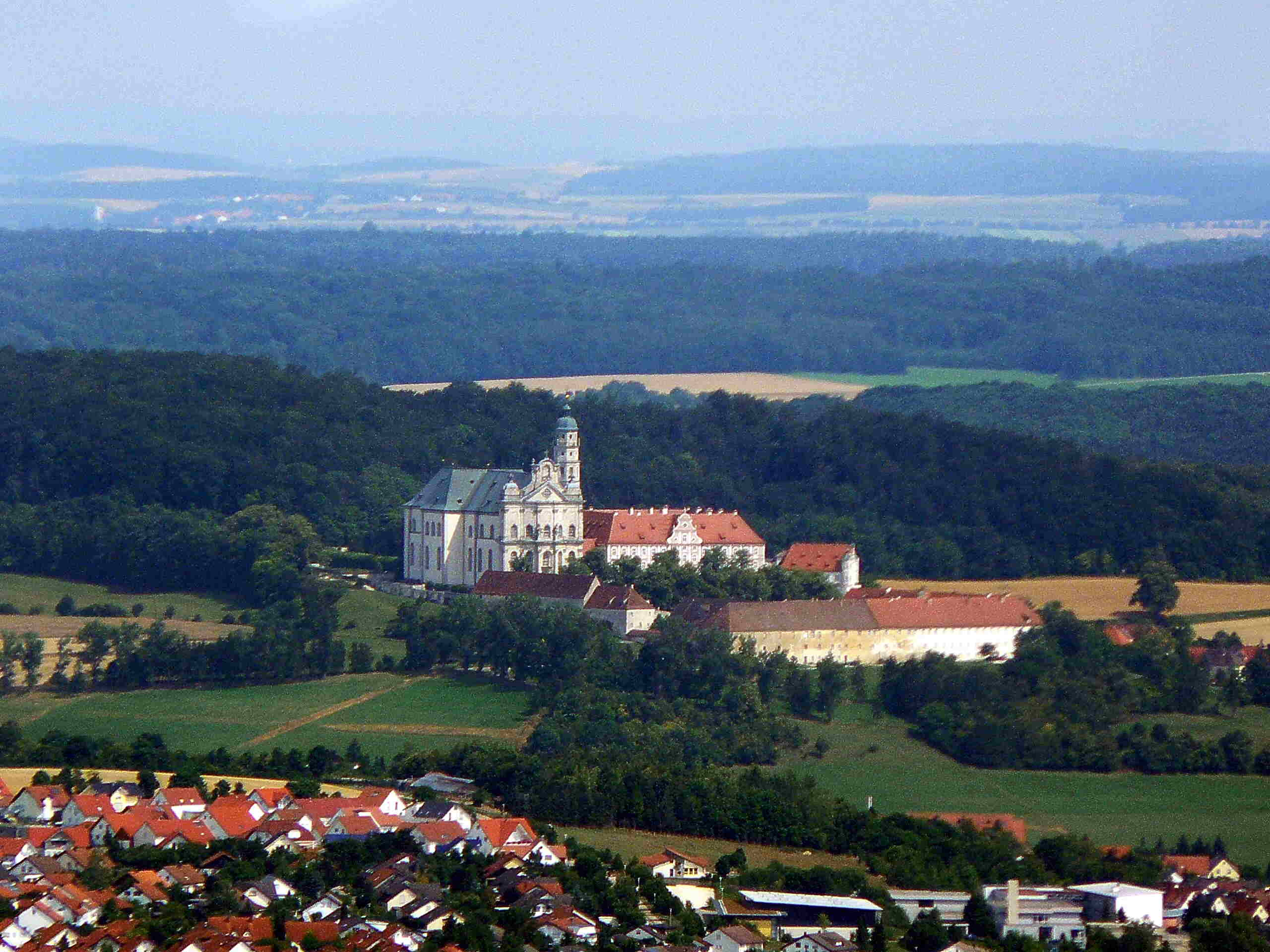 Die Abtei Neresheim aus westlicher Richtung